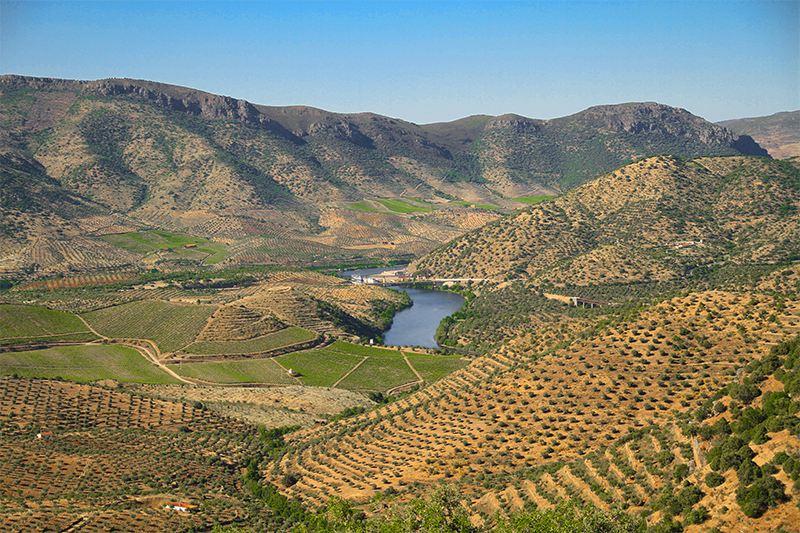 Arribes del Águeda en la zona del muelle de Vega Terrón, provincia de Salamanca, Castilla y León, España